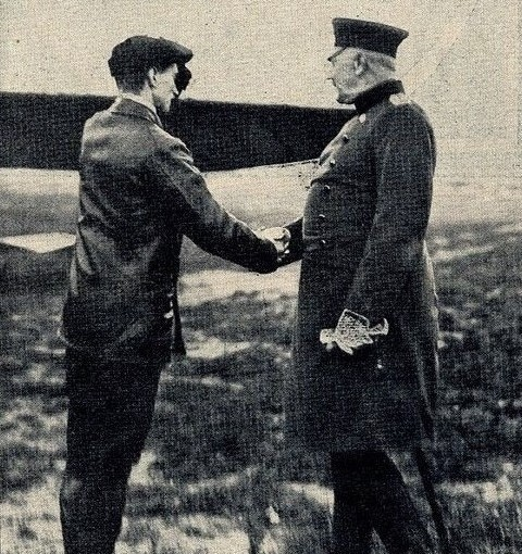 Flugpionier Hermann Dorner im Gespräch mit General Helmuth Johannes Ludwig von Moltke, Nationale Flugwoche in Johannisthal, August 1910